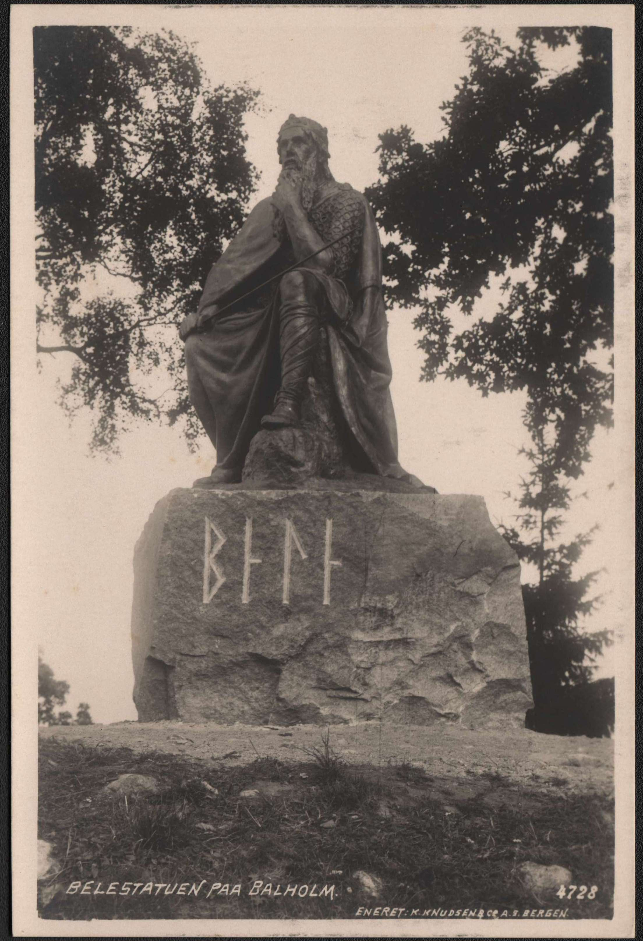 AK Balholm Sogn, Kong Belestatuen